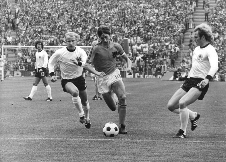 ADN-ZB-Mittelstädt-16.7.74-wen-München: X. Fußball-Weltmeisterschaft- Endspiel BRD gegen Niederlande 2:1 am 7.7.74- Johannes Cruyff (Niederlande, Mitte) setzt sich hier gegen die beiden BRD-Spieler Berti Vogts (2.von links) und Uli Hoeness (rechts) durch.